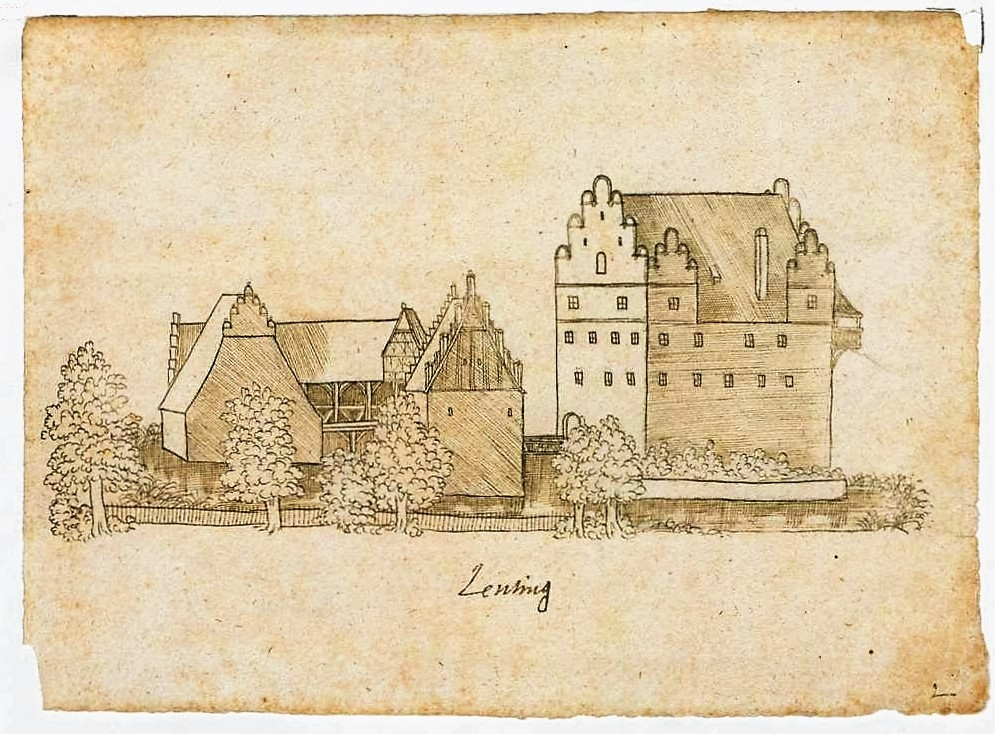 Das Wasserschloss in Lenting, Zeichnung von Philipp Apian